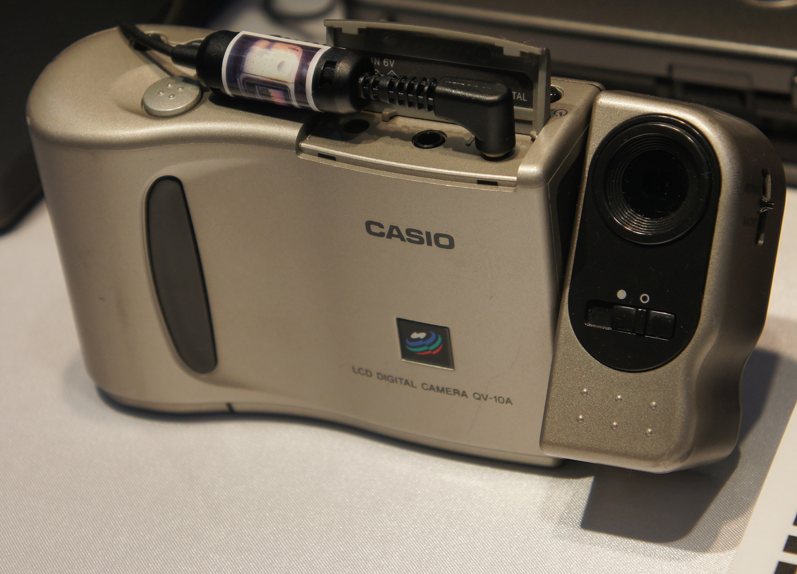 CP+ 2011: 1995 Casio QV-10A